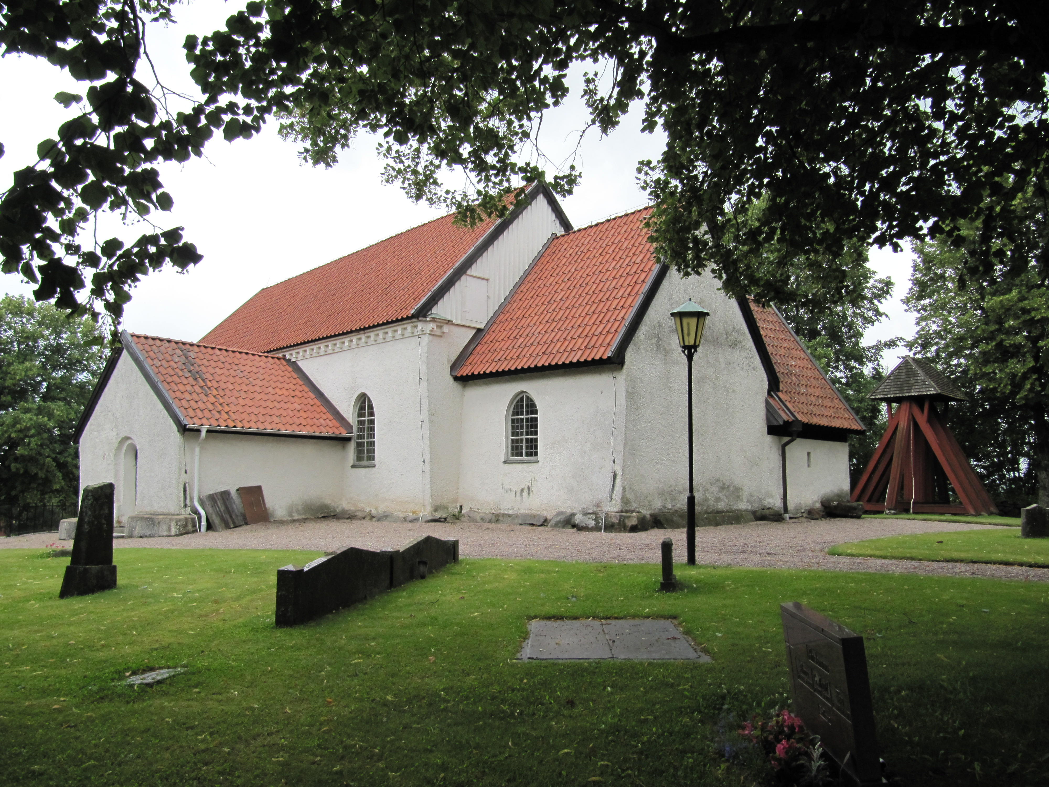 Kållands-Åsaka kyrka